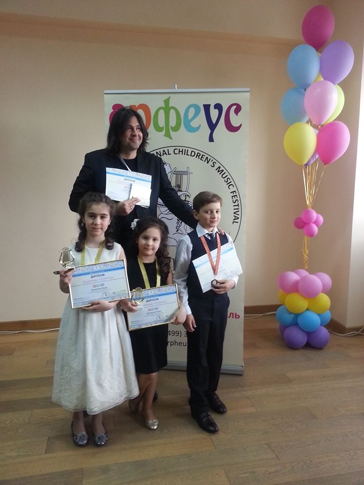 Пианист Карен Корниенко со своими учениками.